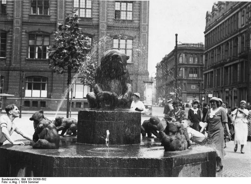 Berlin, Bärenbrunnen am Werderschen Markt ADN-ZB Berlin im Sommer 1934 Bei 30°C im Schatten ist eine kleine Erfrischung am Bärenbrunnen am Werderschen Markt sehr begehrt. 23201-34 [Berlin.- Bärenbrunnen am Werderschen Markt, im Hintergrund Bauakademie]